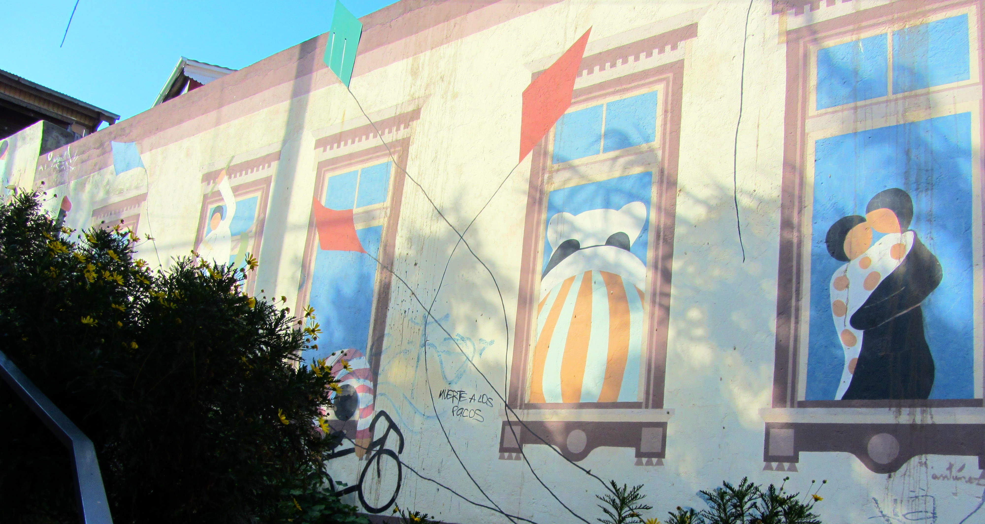 Mural Nº16, Bailarines con volantines (detalle), de Nemesio Antúnez; Museo a Cielo Abrierto, Cerro Bellavista de Valparaíso